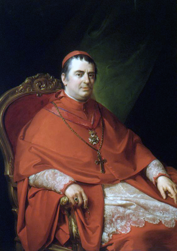 Portrait of Gabriele Ferretti, cardinal